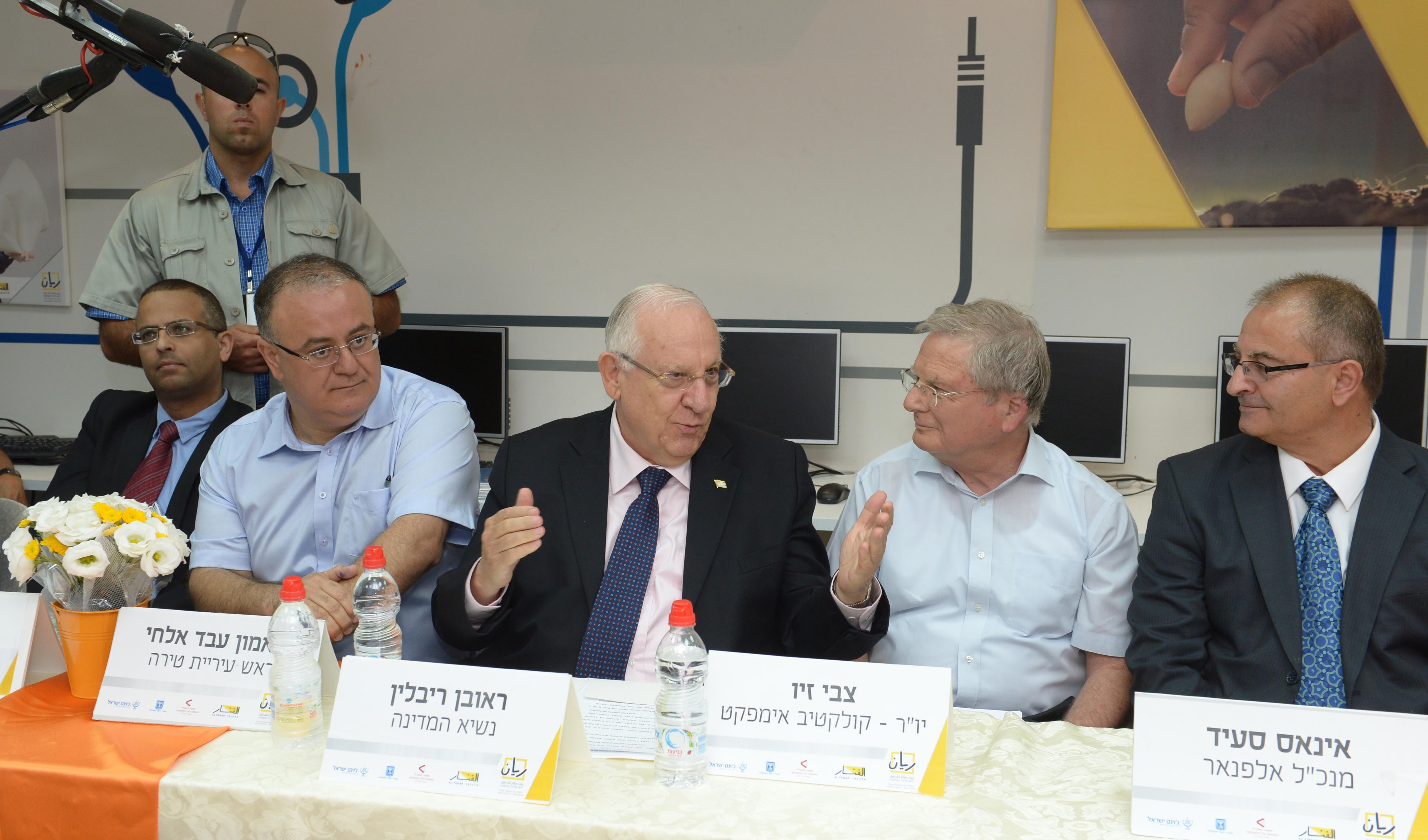 נשיא מדינת ישראל ראובן ריבלין בביקור בעיר טירה מלווה בראש העירייה מאמון עבד אלחי משמאל לריבלין